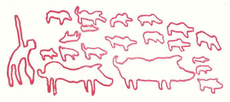 Avbildning av ett hällristningsmotiv från bronsåldern vid Himmelstalund i Norrköping. Hällristningen kallas för Svinhällen, på grund av det stora antalet svin.